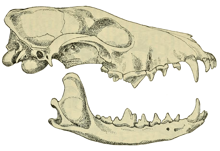 Warrah skull